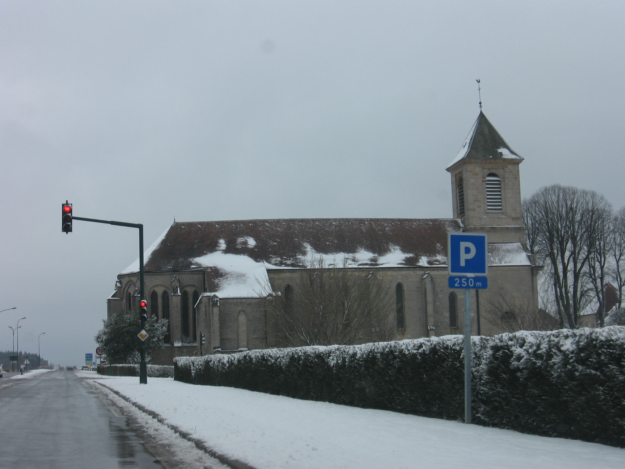 Saints-Geosmes, Haute-Marne